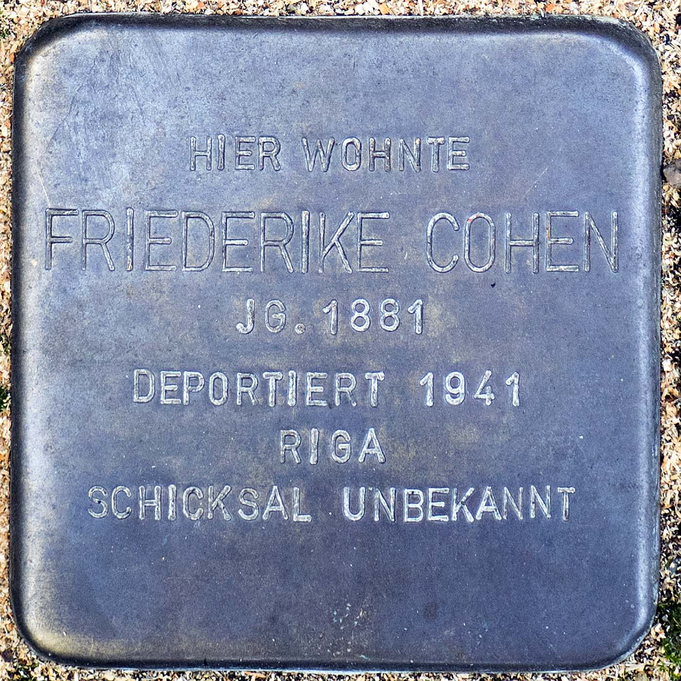 Stolperstein für Friederike Cohen (Willich)